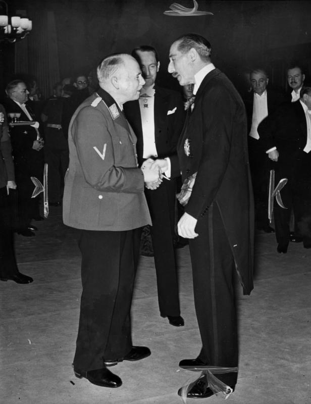 Jahresfest der Deutsch-Englischen Gesellschaft Jahresfest der Deutsch-Englischen Gesellschaft im Haus der Flieger. Herzog von Coburg begrüßt den Botschafter Henderson. Mitte: der Vorsitzende der Deutsch-Englischen Gesellschaft Direktor Lehnkering Abgebildete Personen: Sachsen-Coburg und Gotha, Karl-Eduard von: 1884-1954, Herzog, Präsident des Deutschen Roten Kreuzes, Deutschland Henderson, Neville: Botschafter in Argentinien, Botschafter in Deutschland, Großbritannien